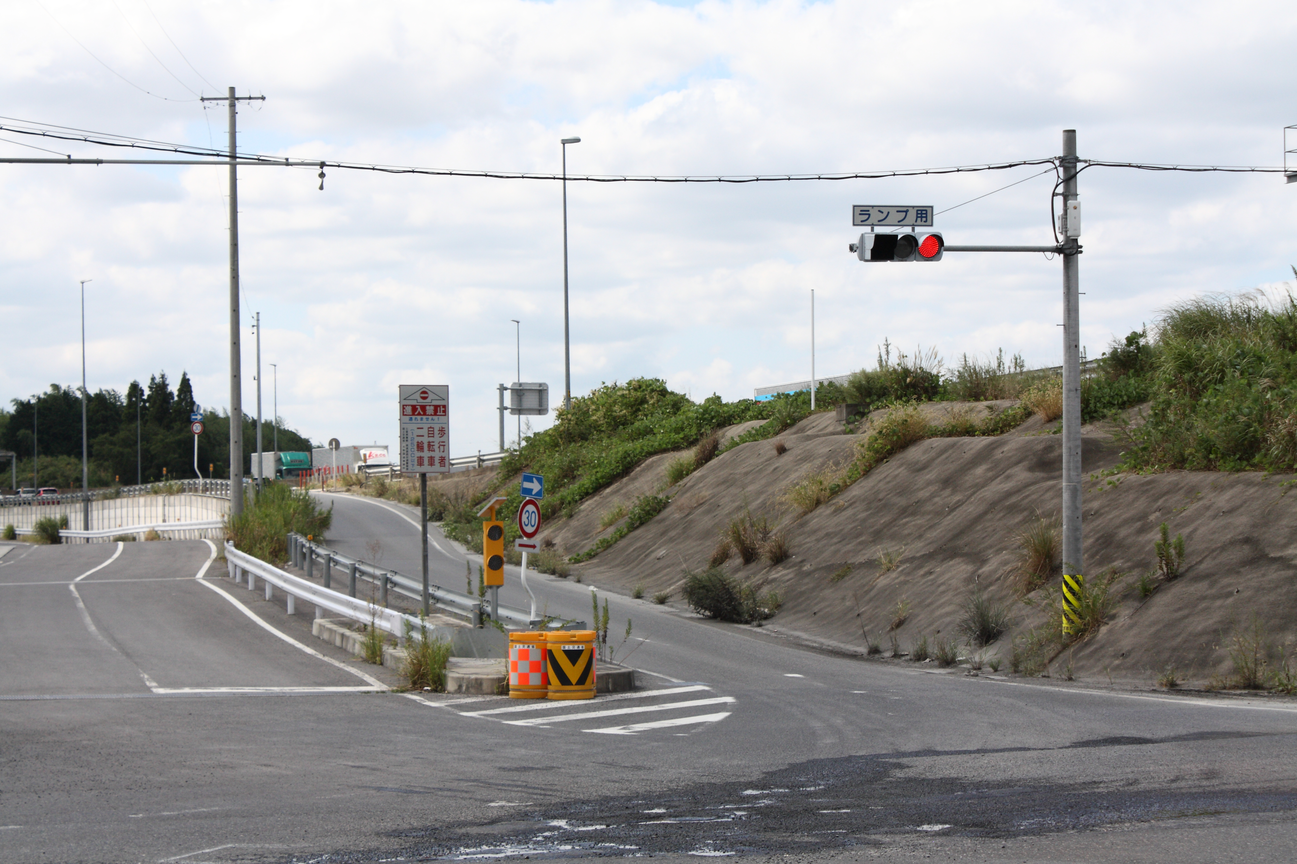 名阪国道 下柘植インターチェンジ（ダイヤモンド型） 天理方面入口 三重県伊賀市下柘植